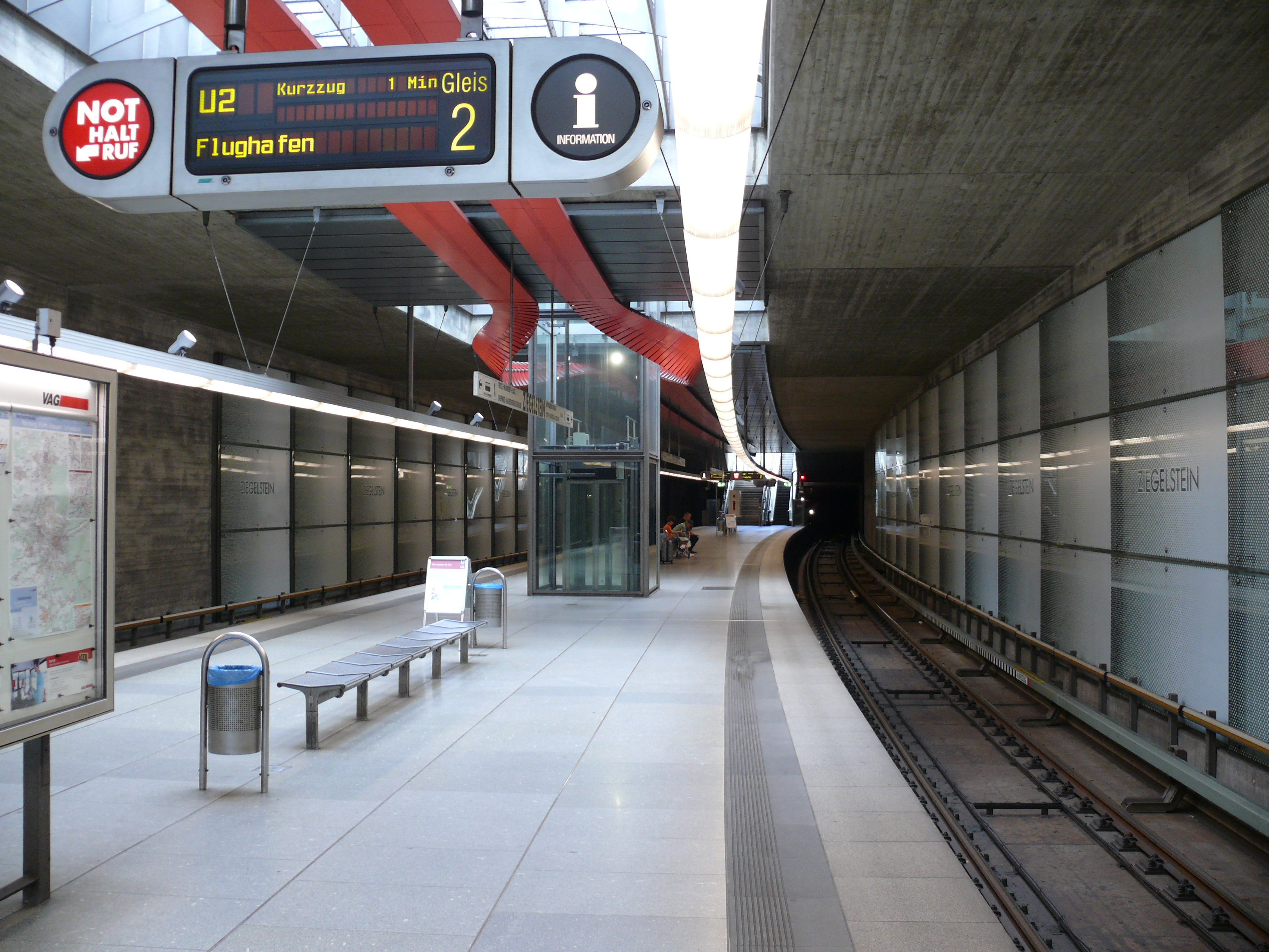 Bahnsteigebene am U-Bahnhof Ziegelstein in Nürnberg.